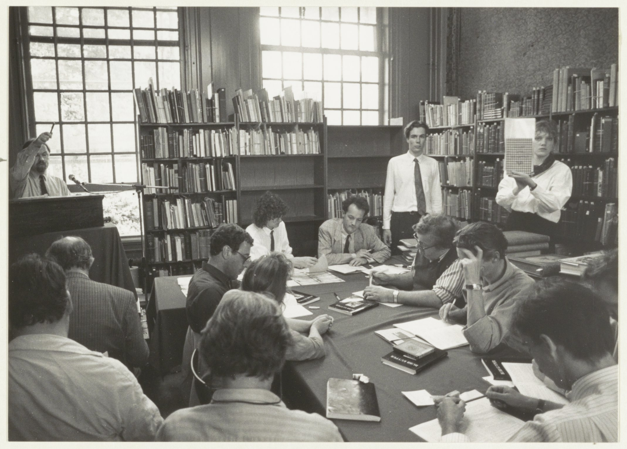 CollectieCollectie Fotoburo de BoerInventarisnummerNL-HlmNHA_54031484NL-HlmNHA_1478_32348KBeschrijvingVeilingmeester Bubb Kuiper (geheel links) tijdens de veiling van de Achterberg collectie. Bibliotheek Hofje van Staats.FotonummerNL-HlmNHA_1478_0891DocumenttypeTopografische prenten, tekeningen en foto'sVervaardigerBoer, Poppe de Soort vervaardigerFotograaf Interieur/ExterieurinterieurAnnotatiesHD090590LandNederland ProvincieNoord-Holland GemeenteHaarlem PlaatsHaarlem StraatJansweg GeografischCentrum Datering gebeurtenis08-05-1990TechniekFoto Trefwoordenantiquairs, hofjes, veilingen